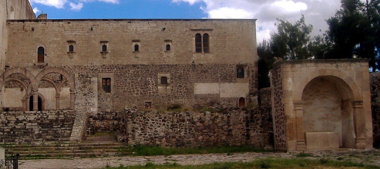 Capilla posa en el atrio del conjunto conventual agustino de Epazoyucan, Hidalgo